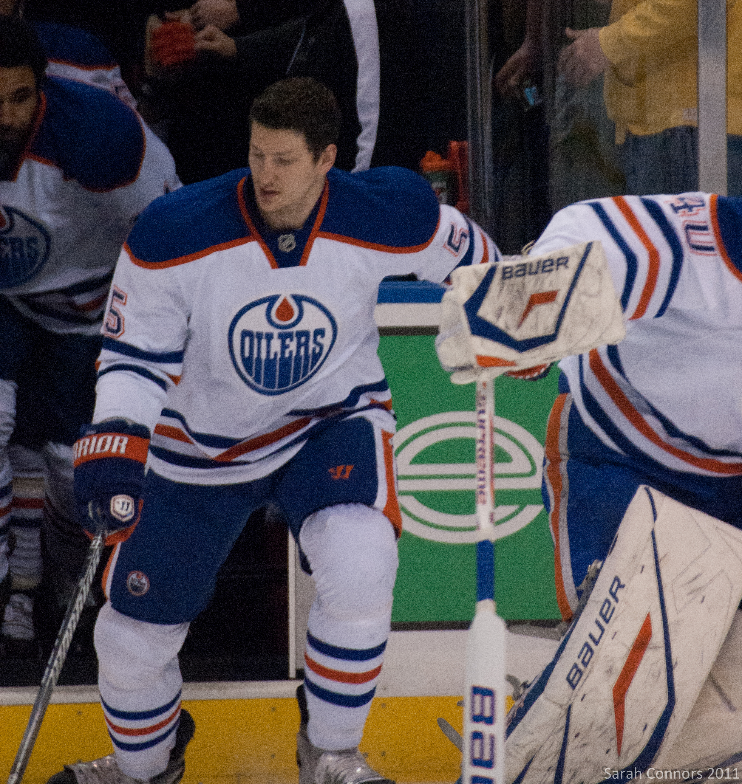 Blues vs. Oilers